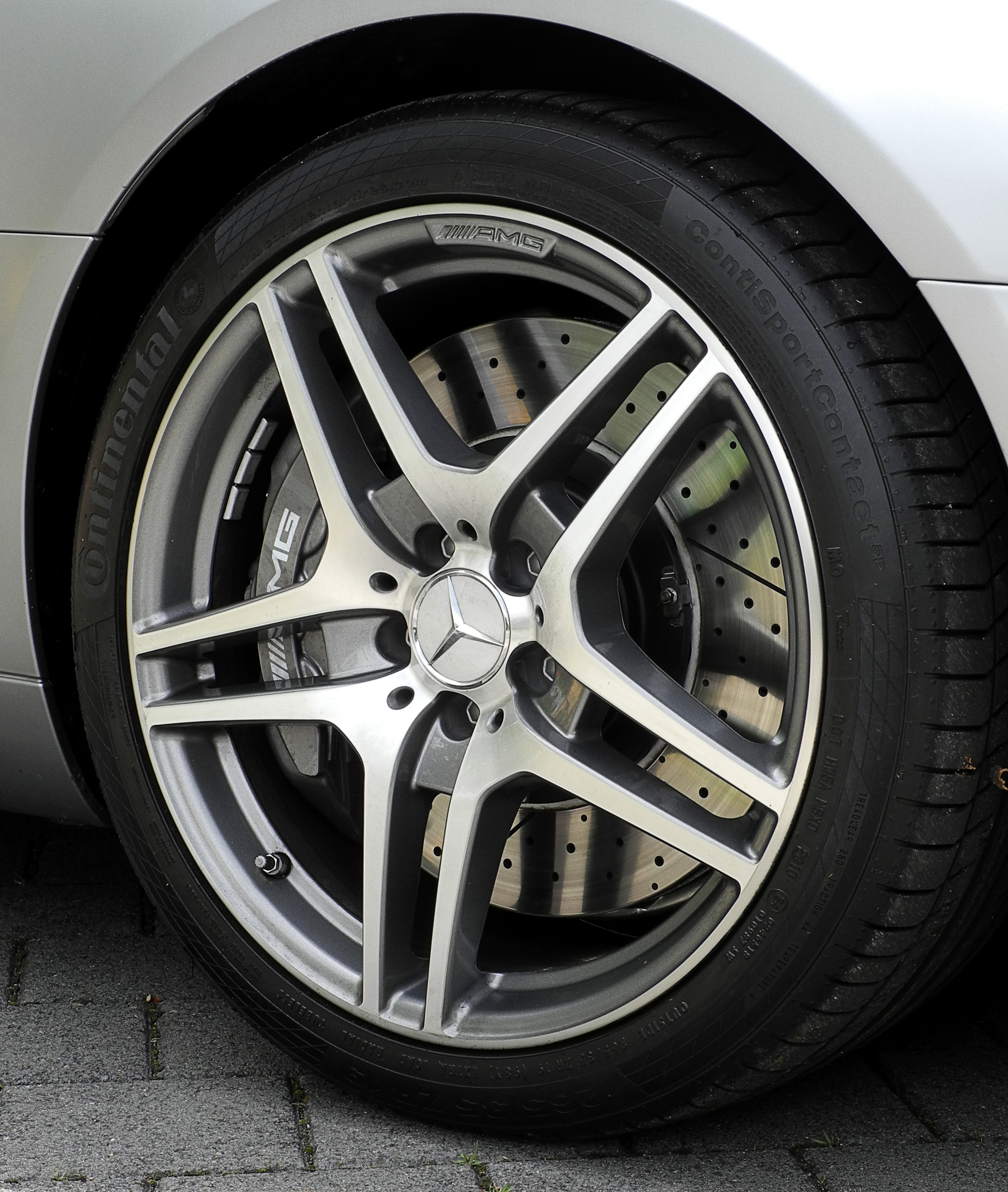 Mercedes-Benz SLS AMG (C 197)